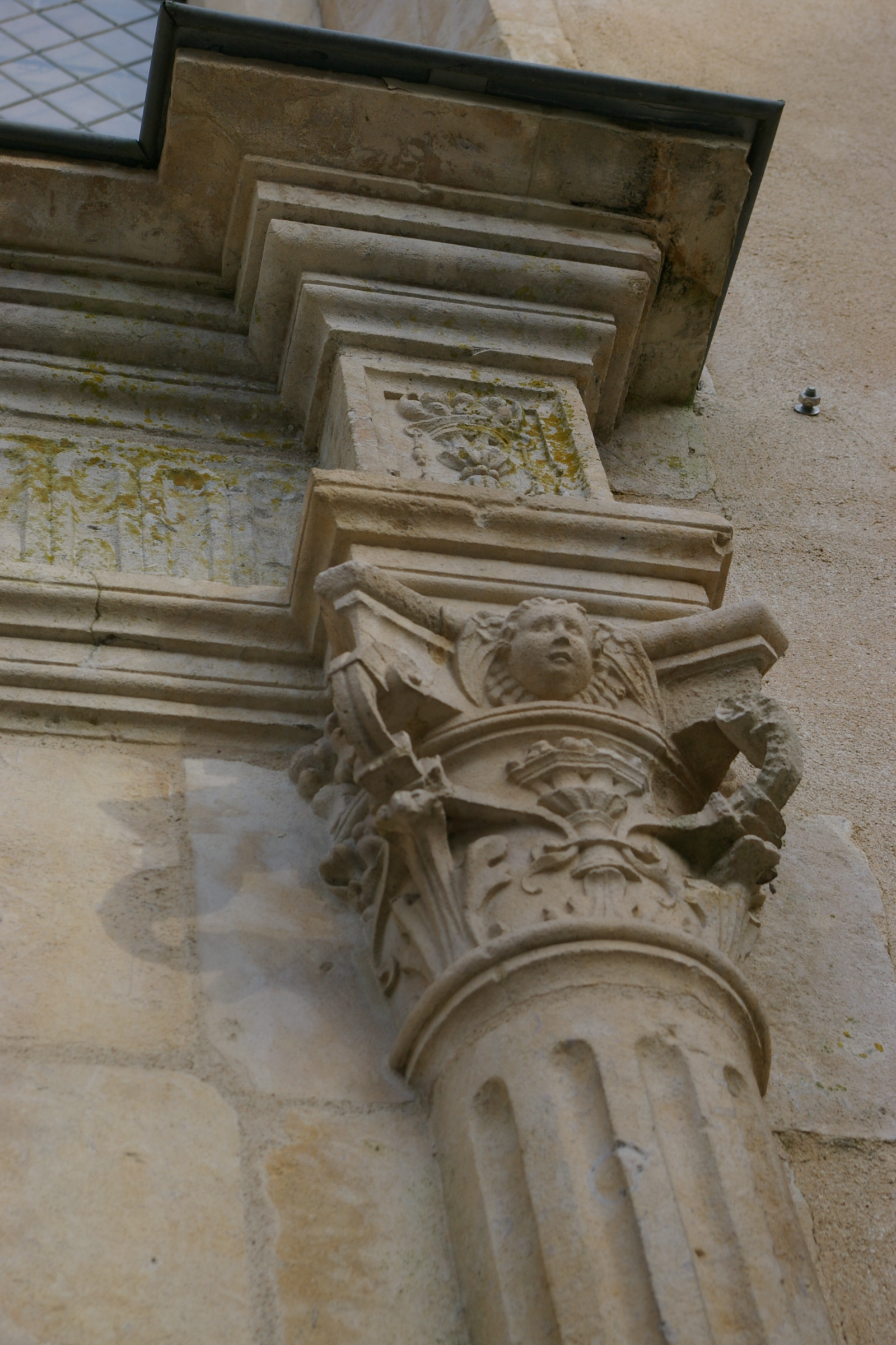 Portail de l'église de Sainte-Suzanne (Mayenne)